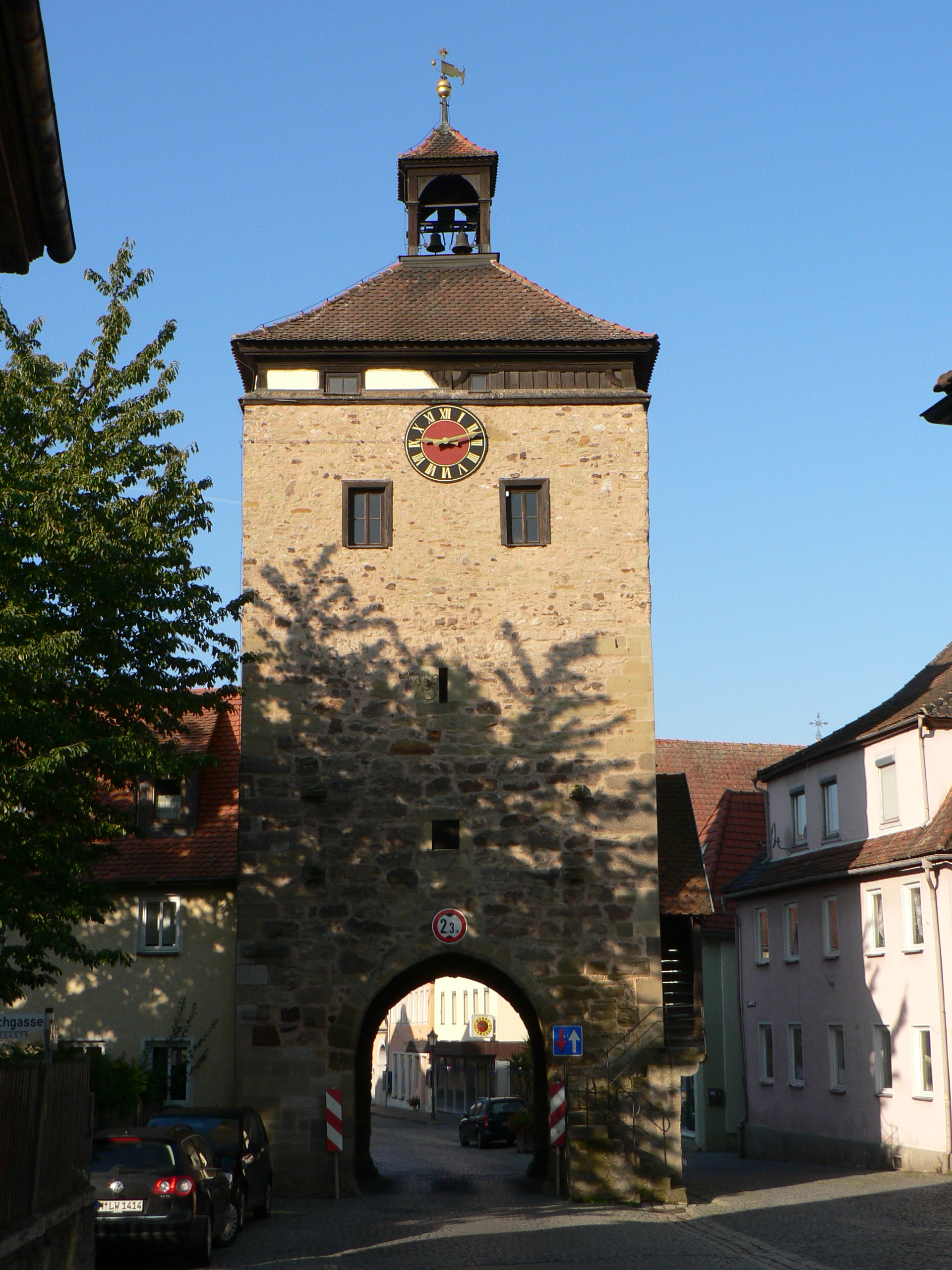 Der Obere Torturm in Scheinfeld